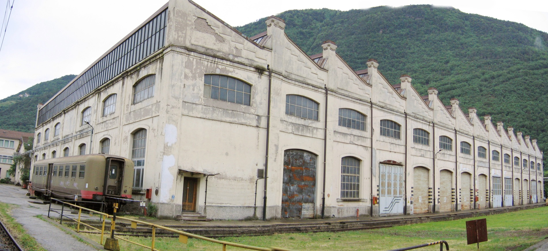 Old train garage at Bolzano train station/Alte Remise Bahnhof Bozen/Vecchia rimessa stazione di Bolzano